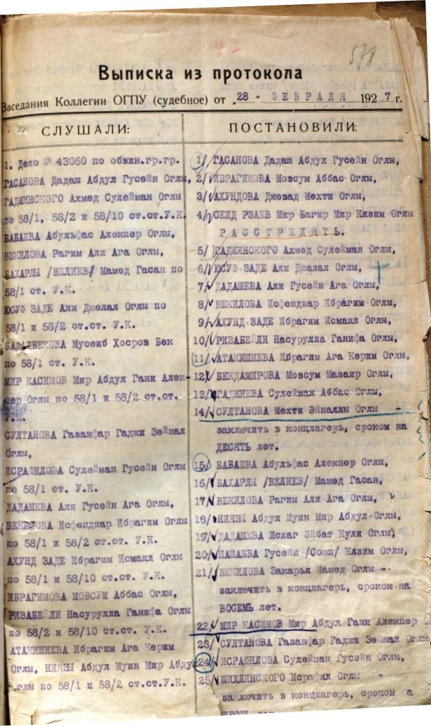 Hokm1927